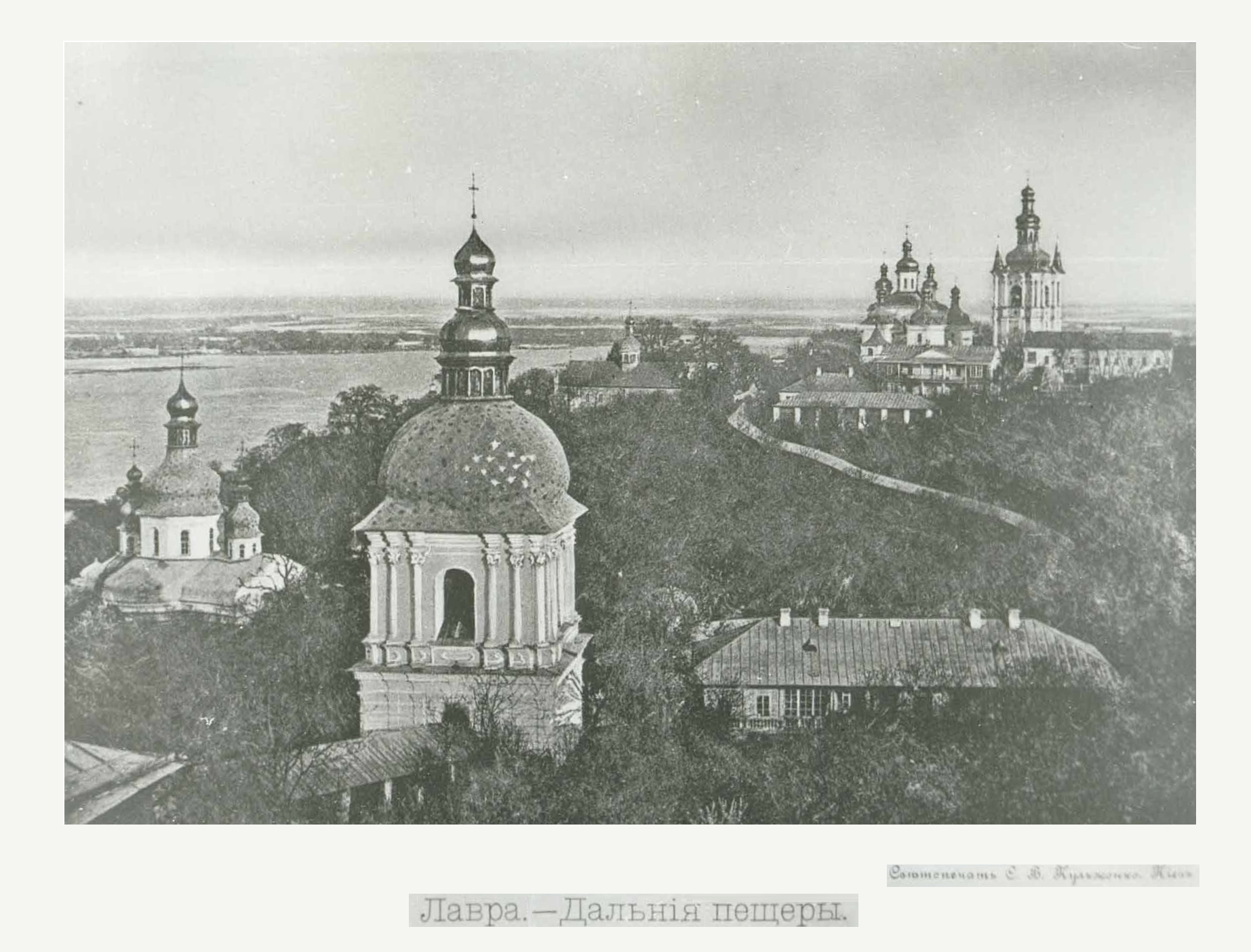 Киево-Печерская лавра, Дальние пещеры.